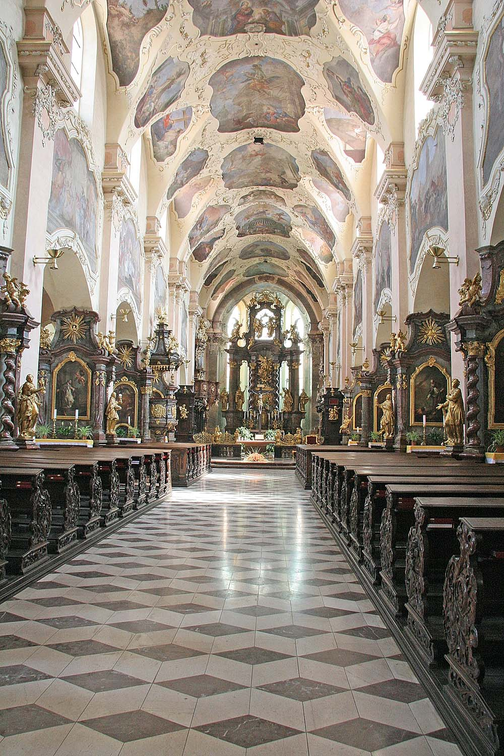 Bazilika Nanebevzetí Panny Marie na Strahově - interiér autor:Prazak date: 7. 2006